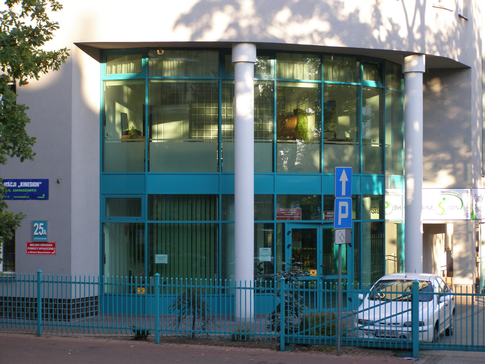 Wojewódzki Inspektorat Ochrony Środowiska w Mińsku Mazowieckim & Miejski Ośrodek Pomocy Społecznej w Mińsku Mazowieckim (Environment Inspection)